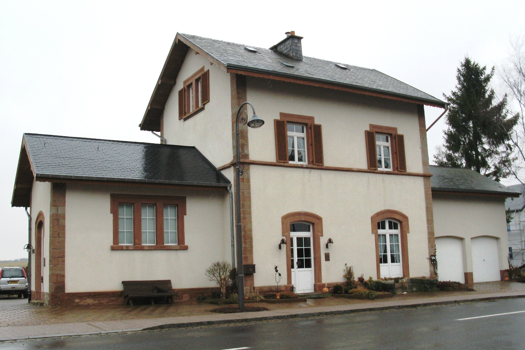 D'Gare vu Wilwerdang am Februar 2009. Kategorie:Gemeng Ëlwen Wilwerdang